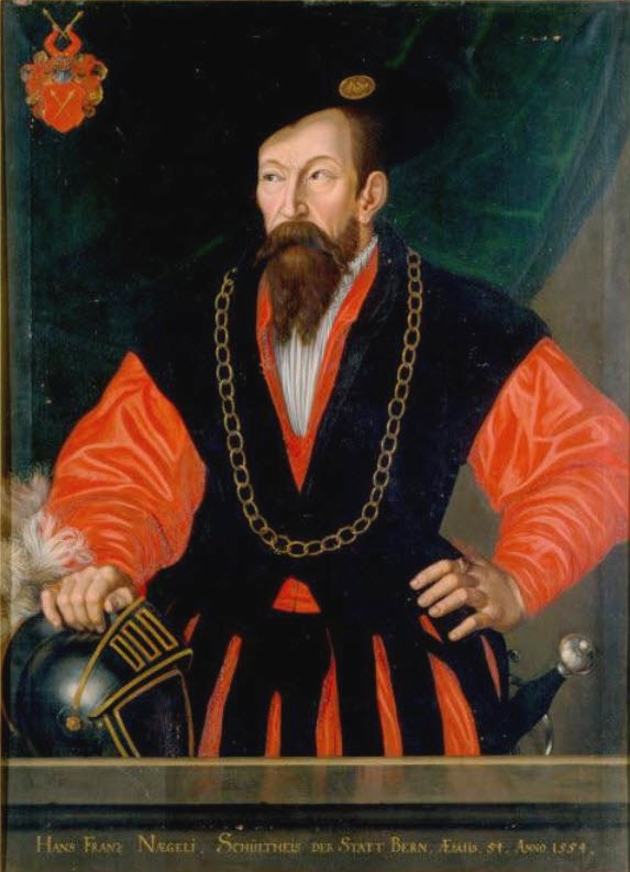 Bildnis Hans Franz Nägeli, Schultheiss von Bern.